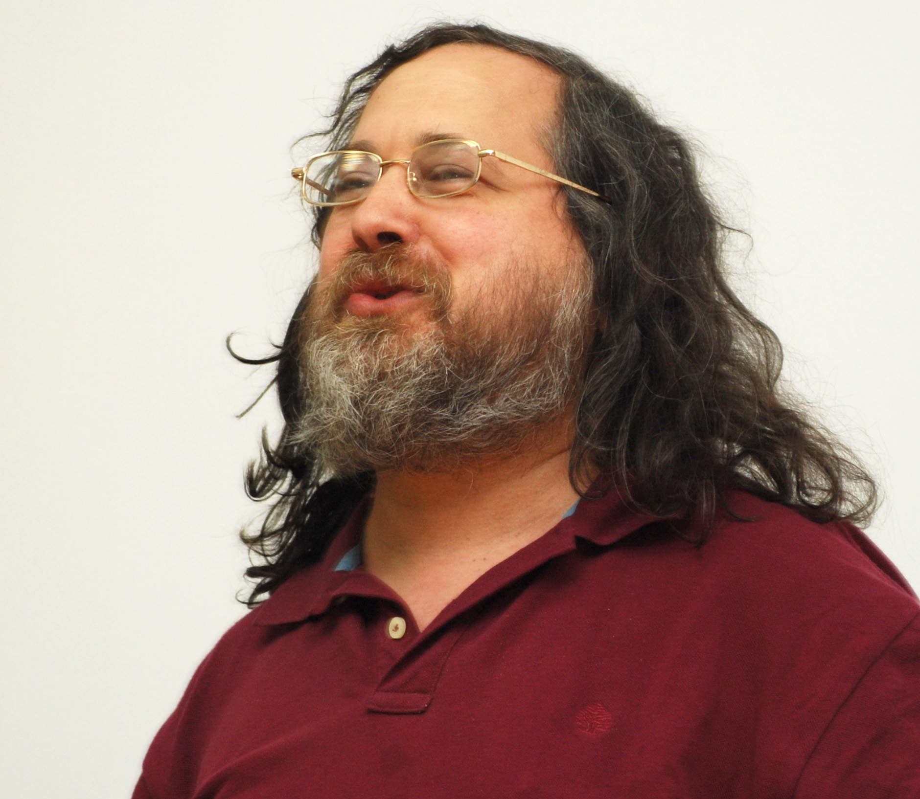 Konferencja Wikimedia Polska 2009 Richard Stallman